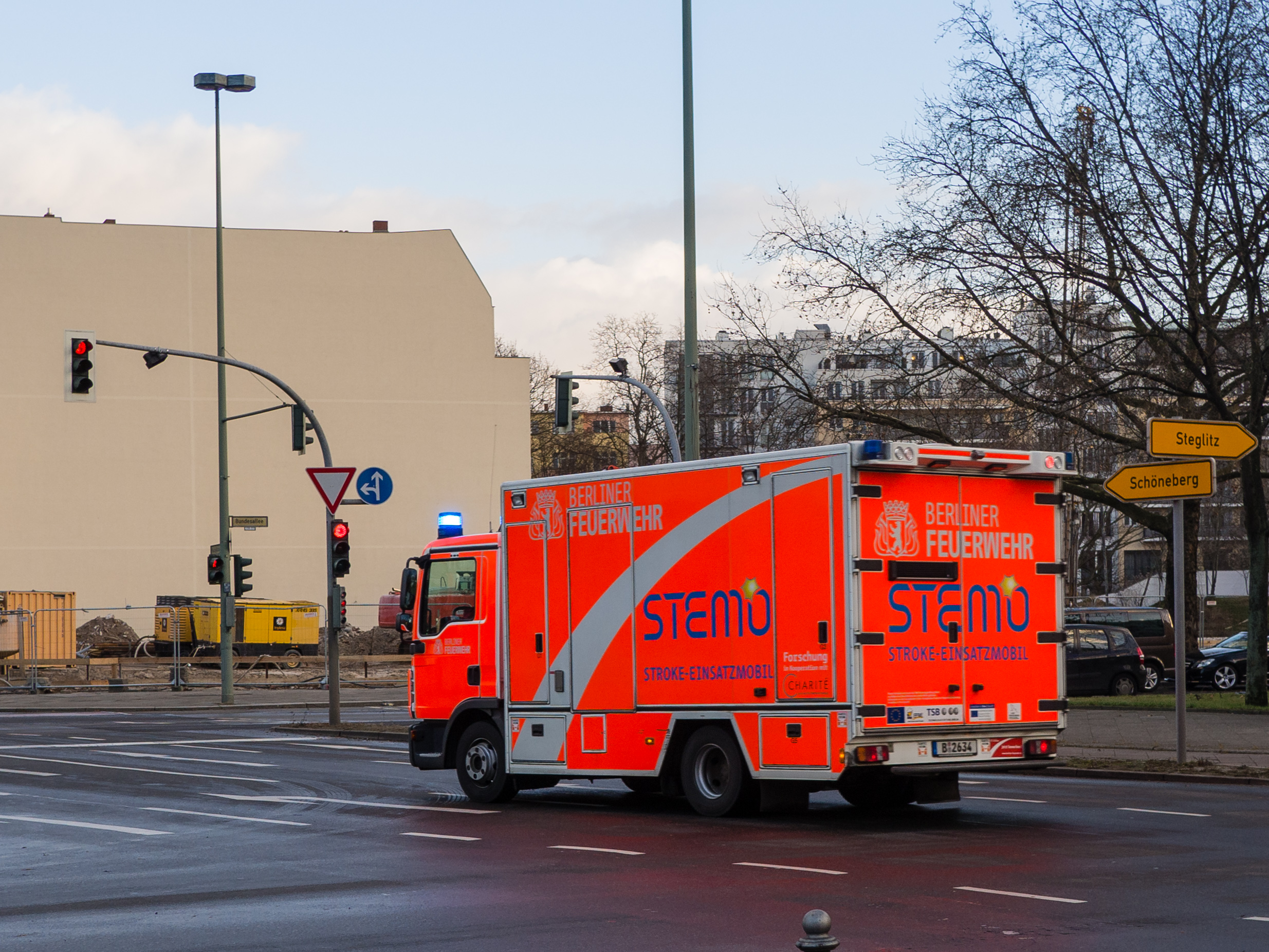 Stroke-Einsatzmobil der Berliner Feuerwehr (STEMO) an der Kreuzung Bundesallee/Hohenzollerndamm in Berlin-Wilmersdorf.